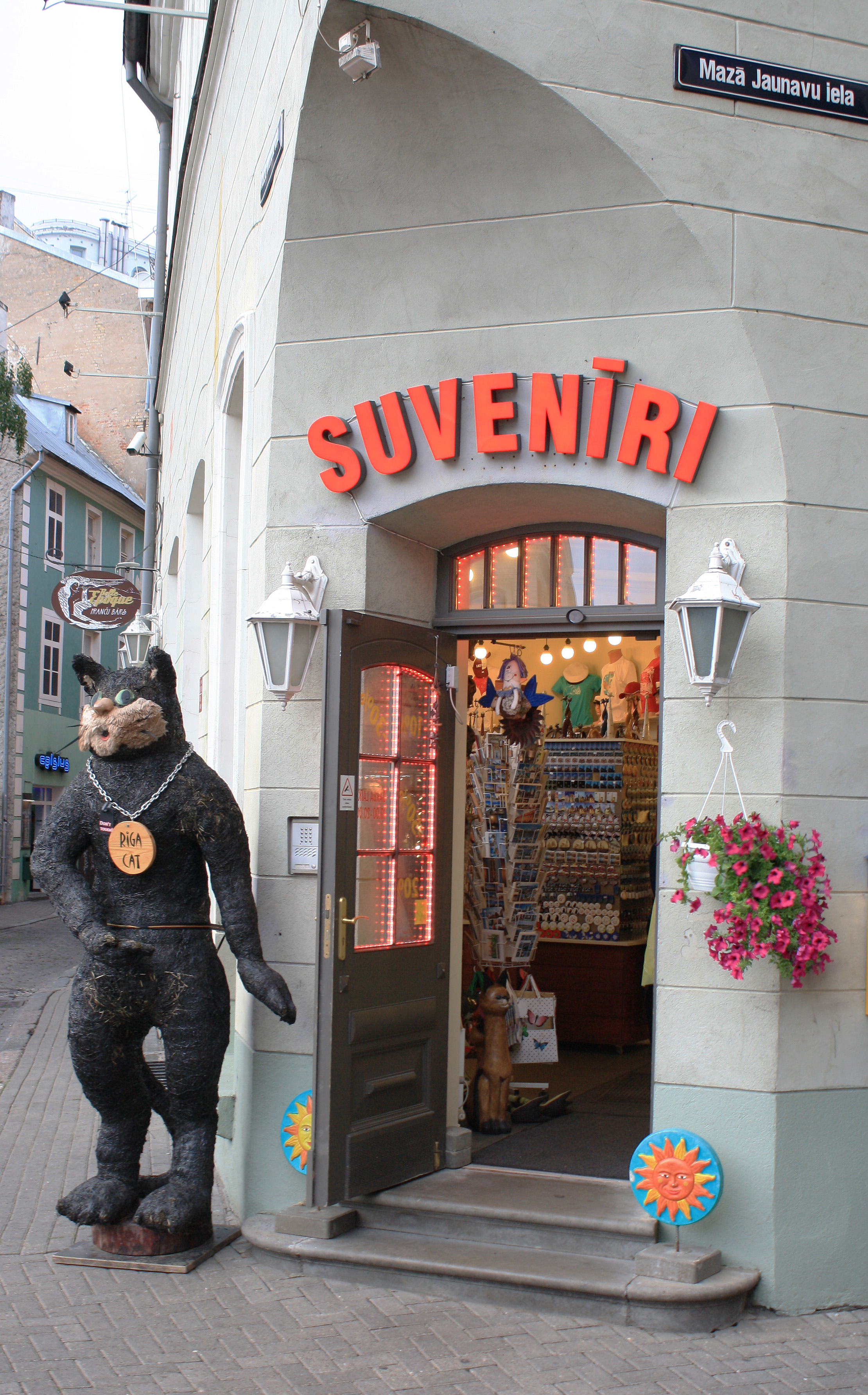 Рига (Латвия) Старый город продажа сувениров